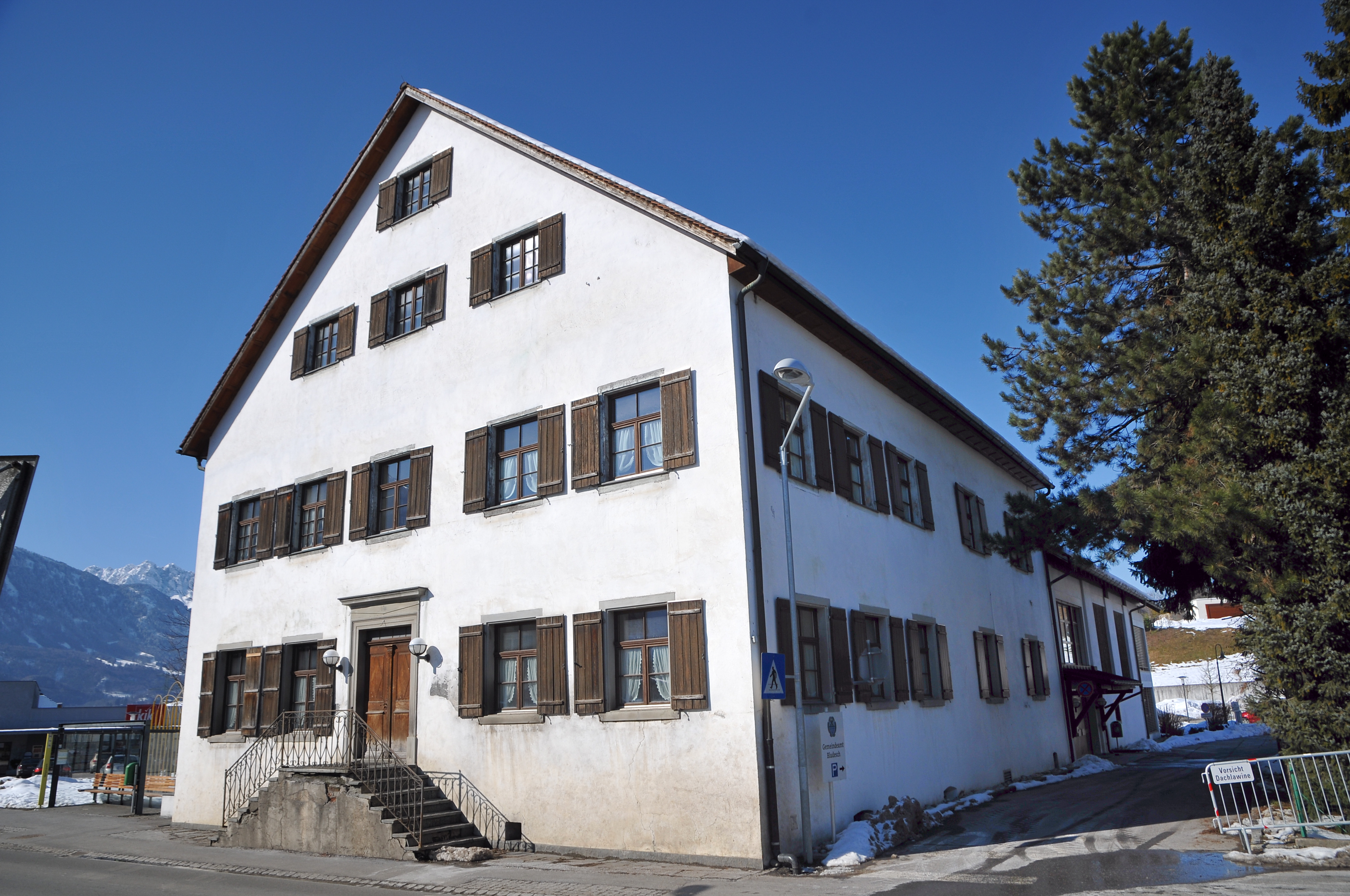 Ansitz, Amtsgebäude, Gemeindeamt, Ehemaliger Ansitz Oberhalden, Ehemaliges Gasthaus Krone an der Hauptstraße 9, in Bludesch.